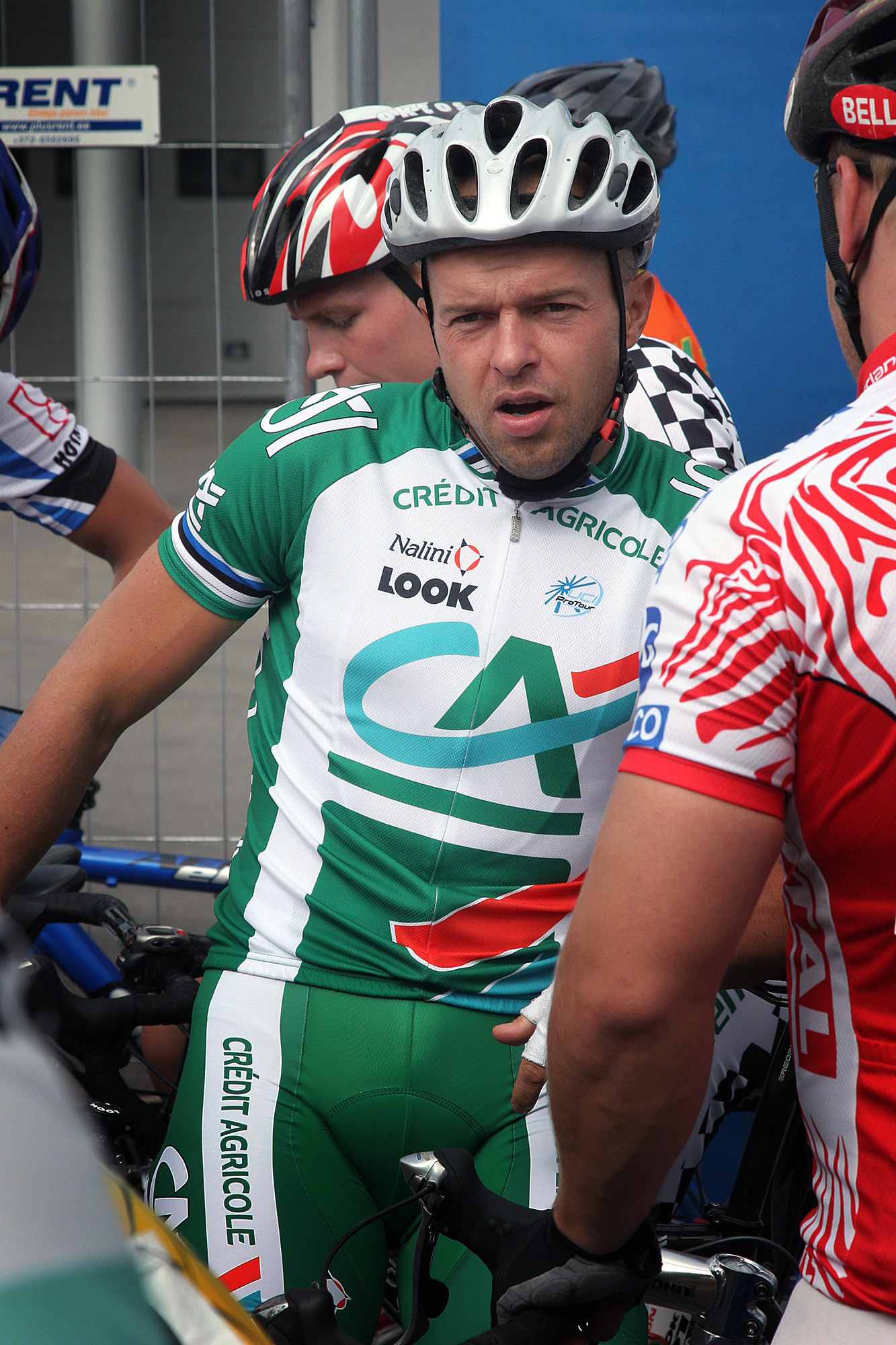 Jaan Kirsipuu Tallinnas 2006